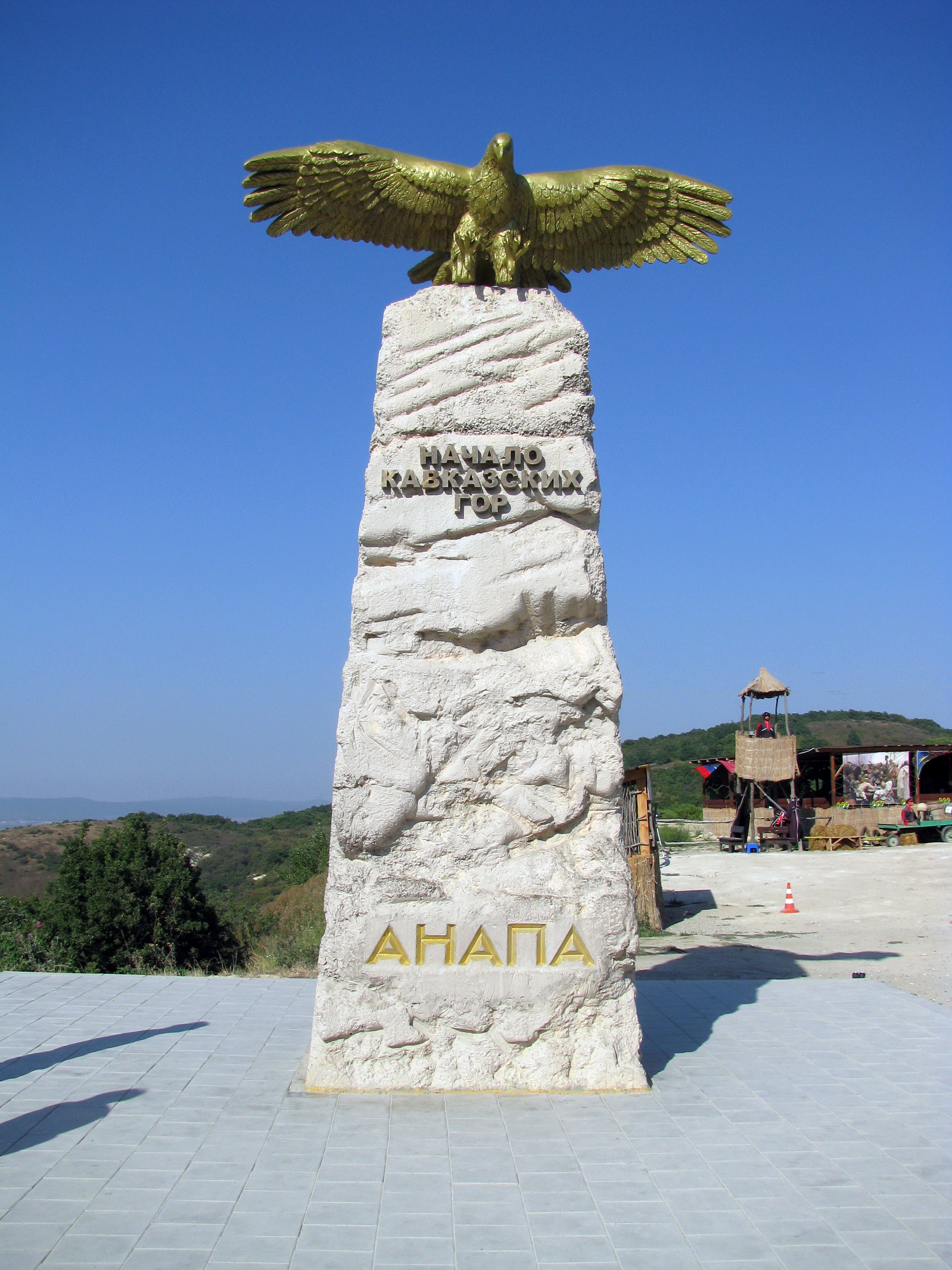 Начало кавказских гор, городской округ Анапа